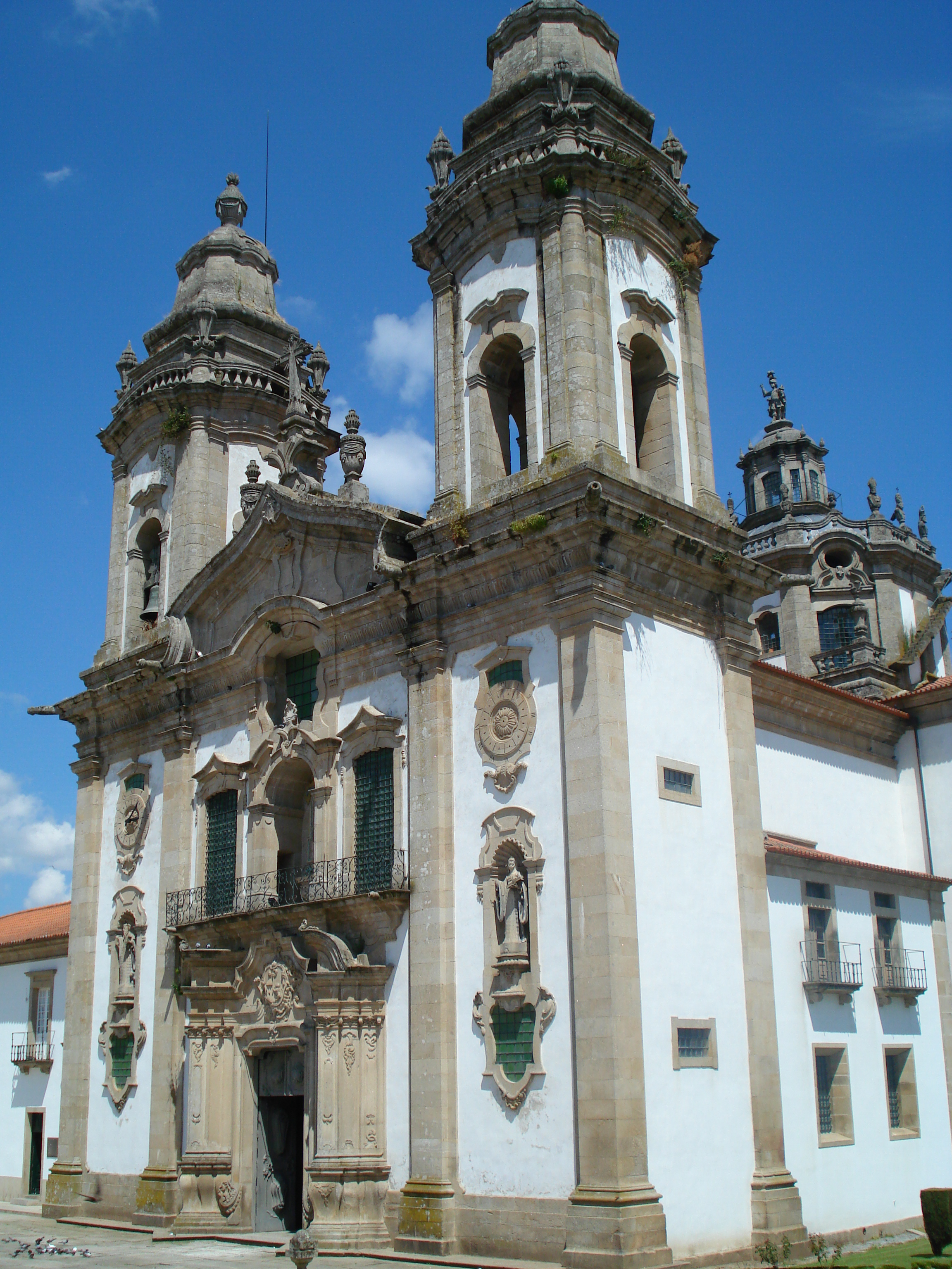 O Mosteiro de São Miguel de Refojos de Basto, fica situado na freguesia de Refojos, em Cabeceiras de Basto, Portugal.